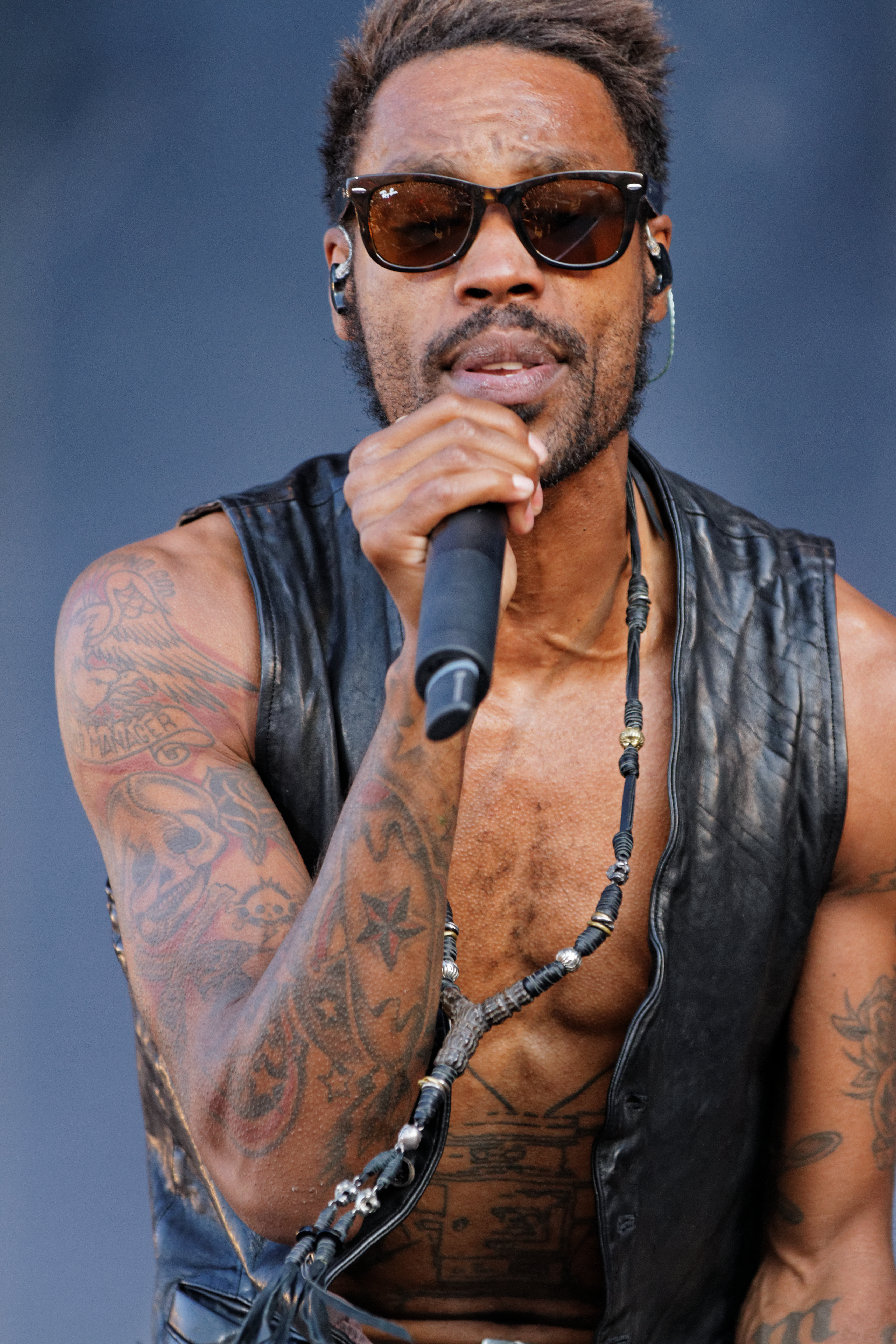 Skip The Use en concert sur la scène Kerouac lors du festival des Vieilles Charrues 2014.